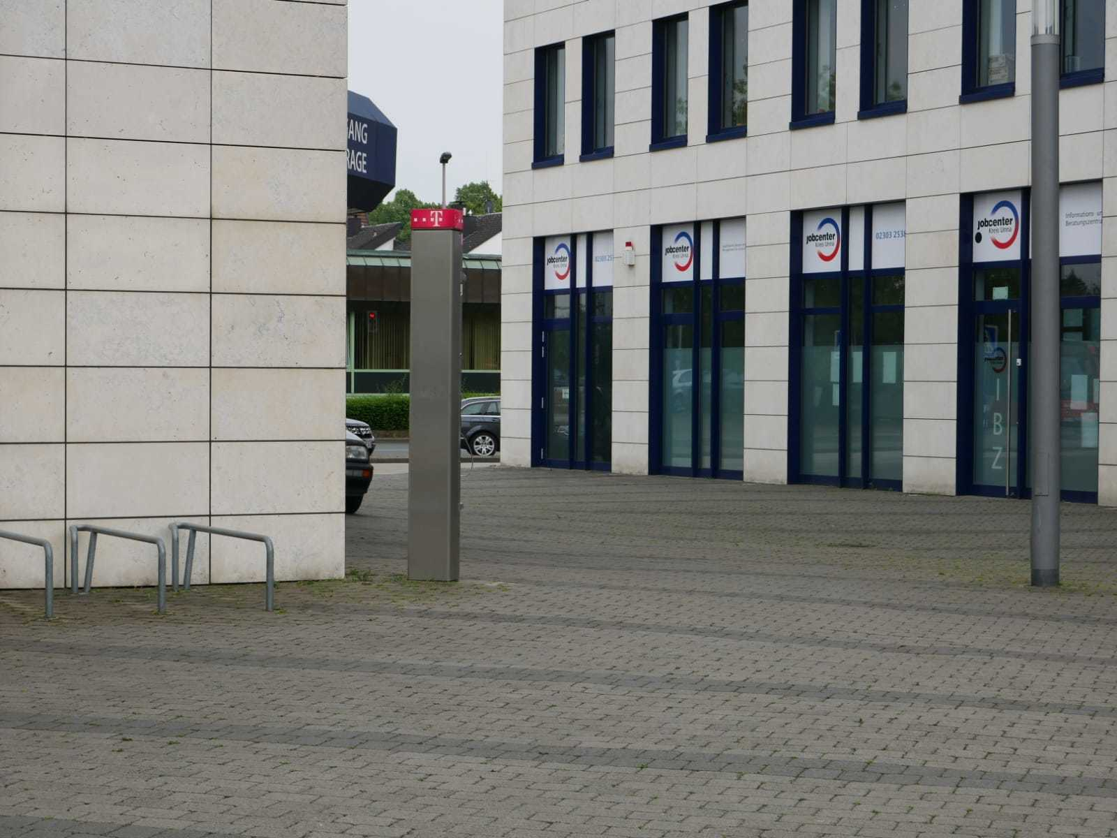 Einer der Eingänge in die Anlage (erste Tür von links).